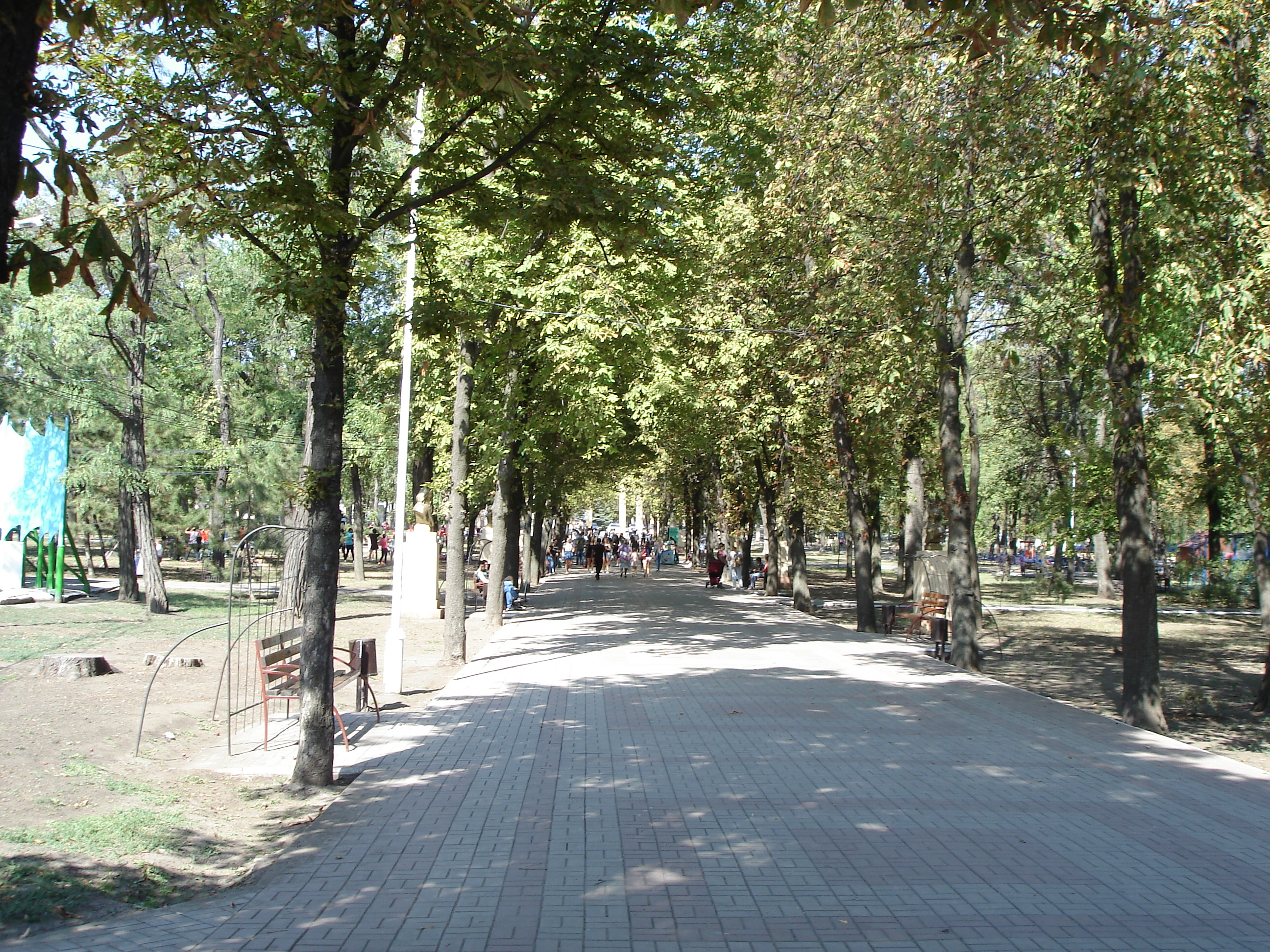 центральная аллея Городского сада вид с юга